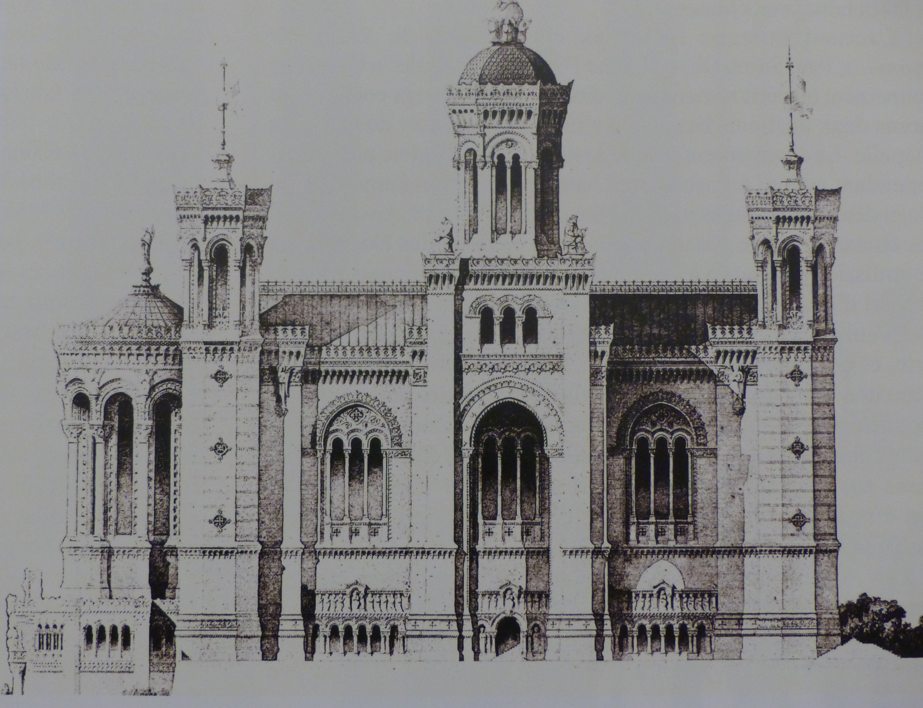 Aquarelle de Frédéric Giniez, datant de 1865, inspirée des croquis réalisés par Pierre Bossan. Vue de la future façade septentrionale de la basilique Notre-Dame de Fourvière, à Lyon ; proposition (non réalisée) pour un clocher supportant la statue de Marie.